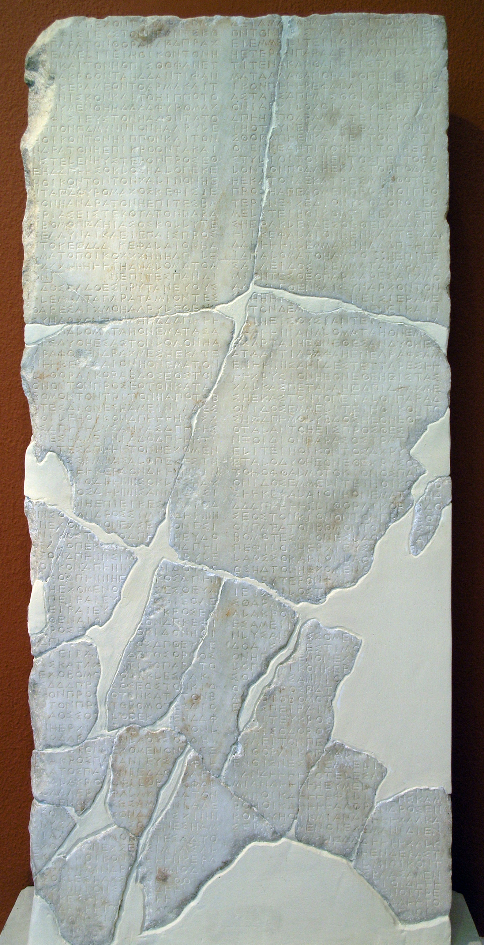 Comptes de construction de l'Érechthéion, 408/7 av. J.-C.